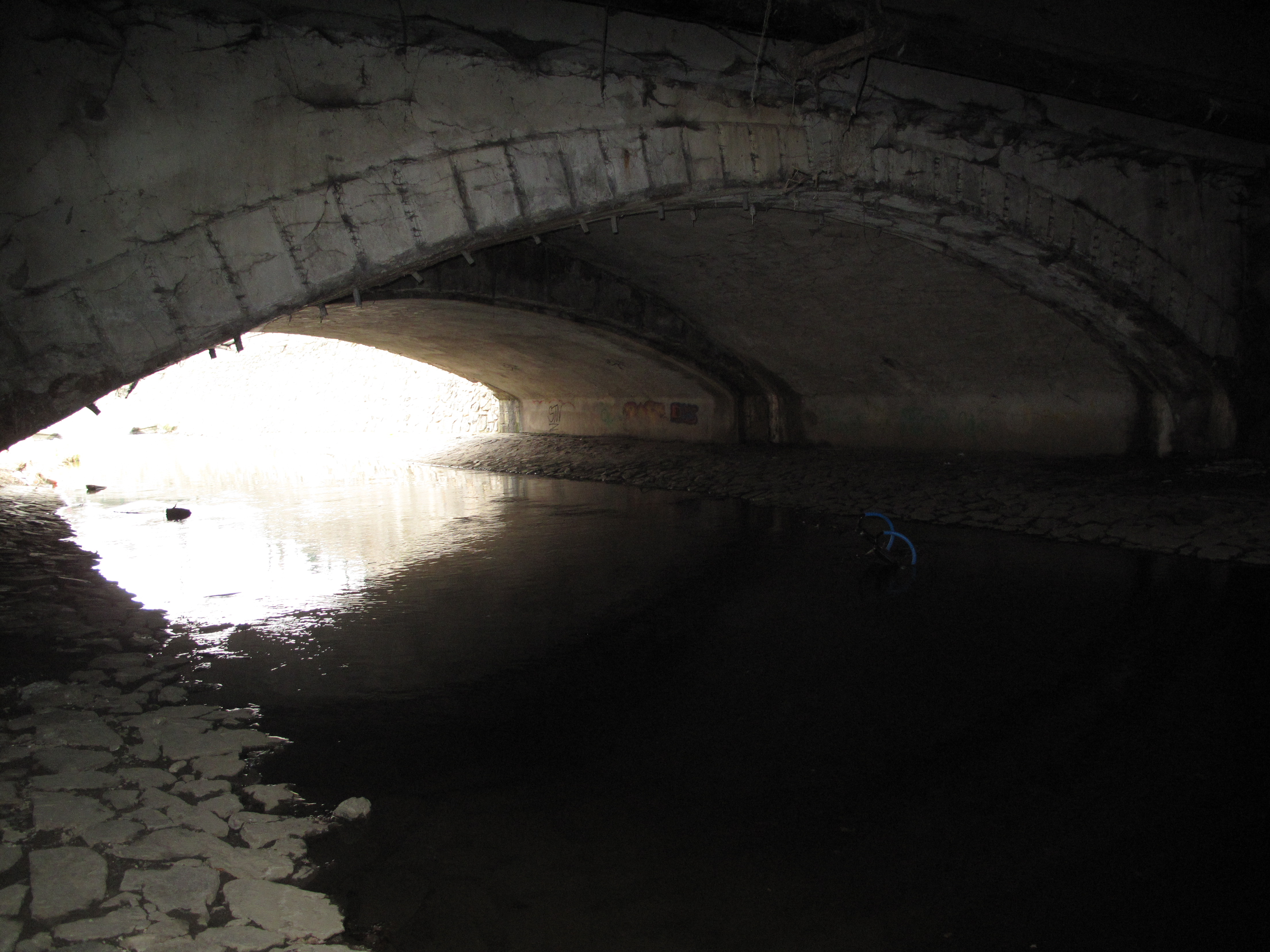 Rokytka pod Zenklovou, nejstarší betonový most